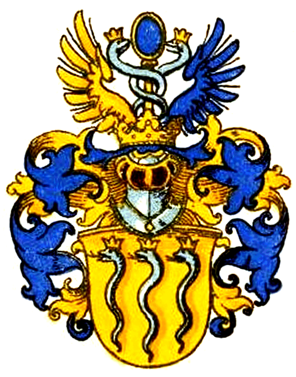 Wappen derer von Rehbinder